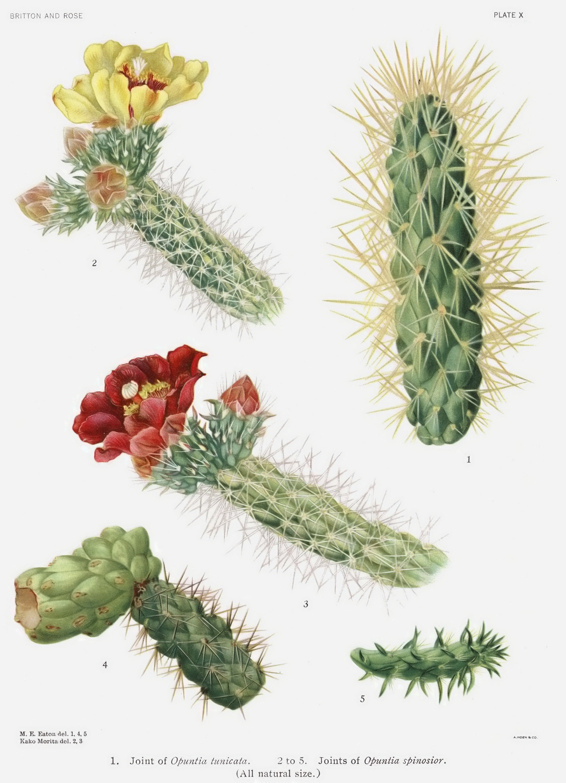 1. Cylindropuntia tunicata, 2-5. Cylindropuntia spinosior.